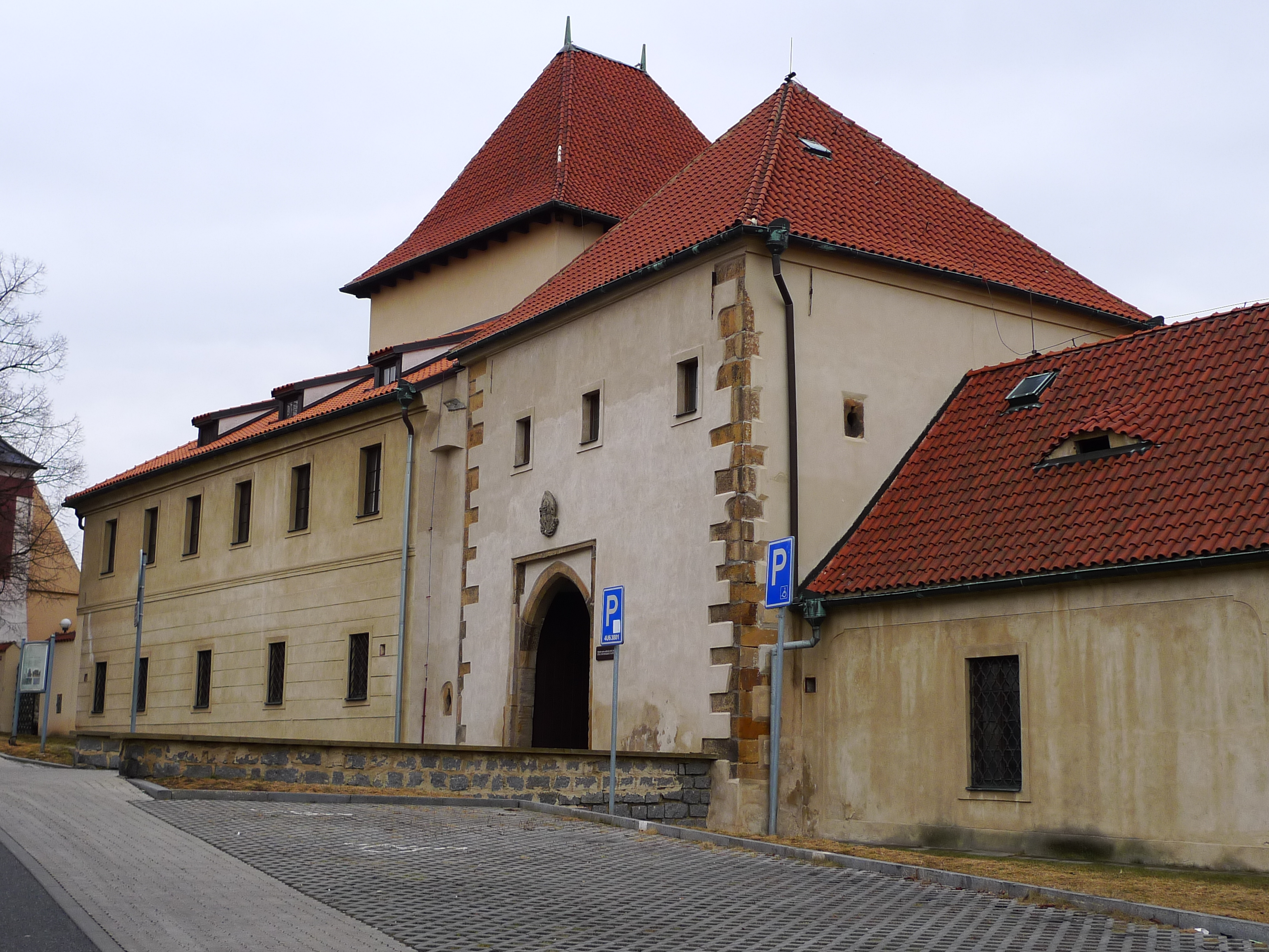 Hrad (Kadaň), Kadaň 567